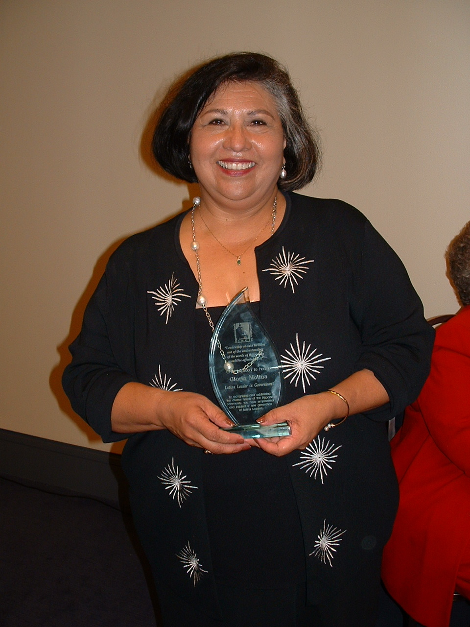 Gloria MolinaGloria Molina